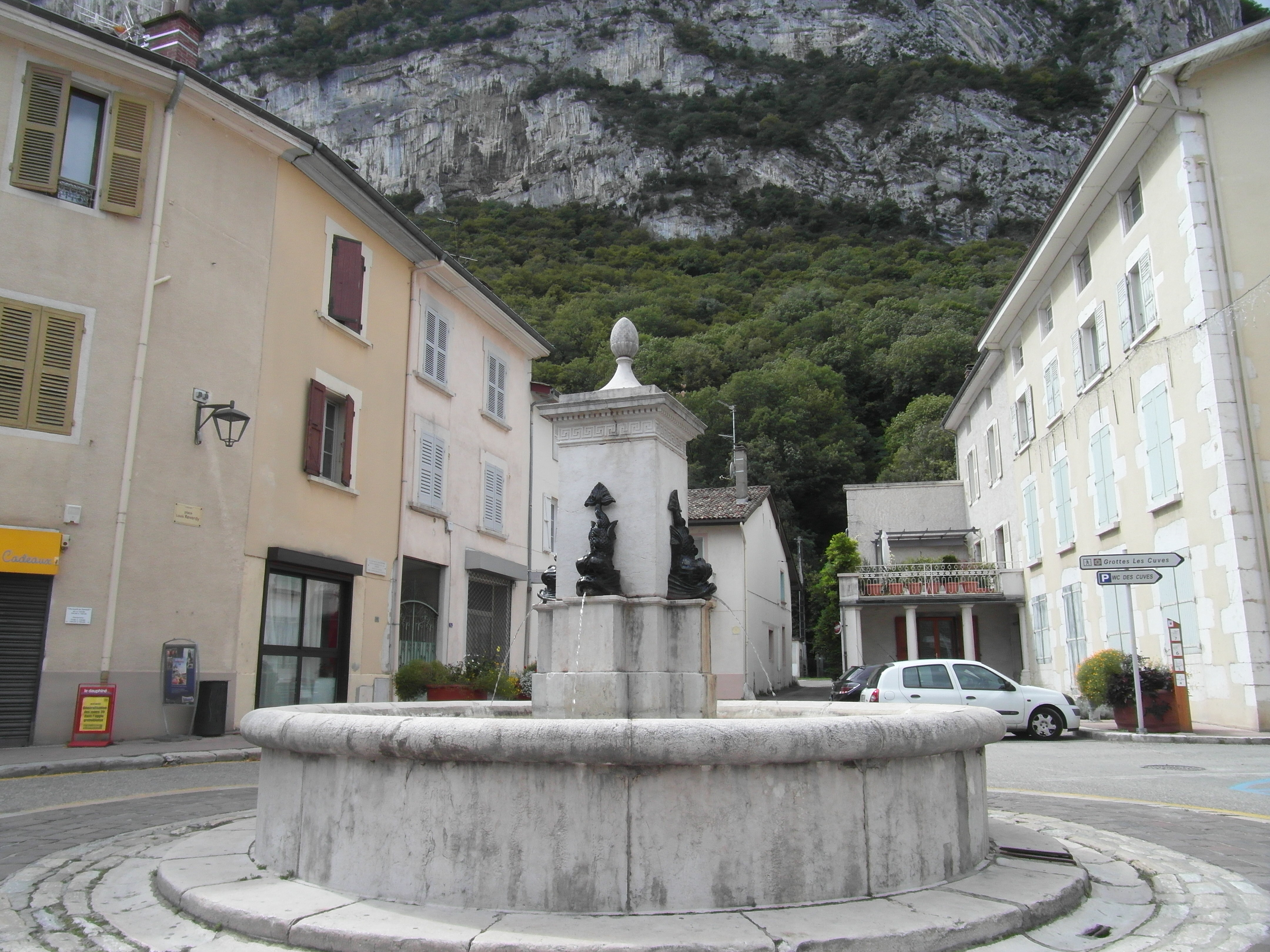 Fontaine à Sassenage